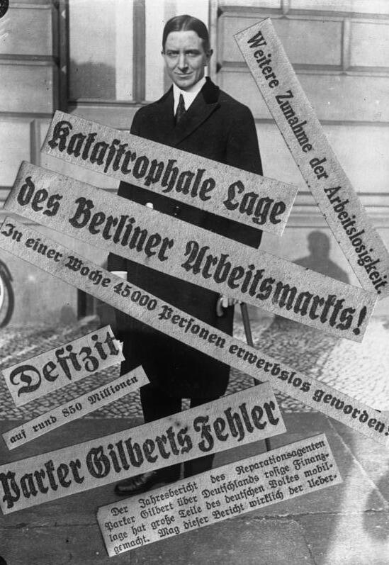 Was der amerikanische Reparationsagent in seinem Jahresbericht, welcher in der ganzen Welt grösstes Aufsehen erregte, nicht angegeben hat. Die Not der deutschen Wirtschaft im Spiegel der Presse, welche Parker Gilbert in seinem Bericht nicht angegeben hat.